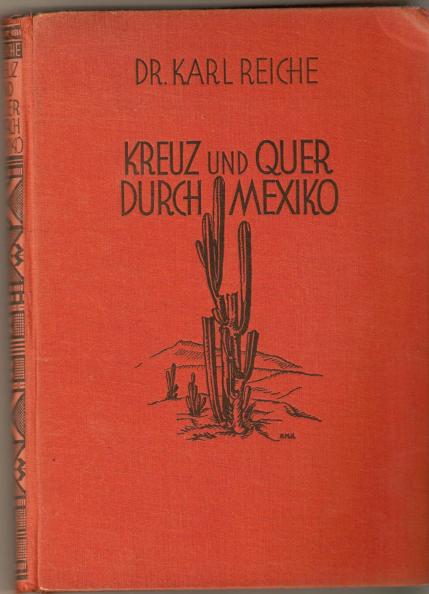 Kreuz und Quer durch Mexico Verlag Deutsche Buchwerstätten G.m.b.H Leipzig 1930 S.128